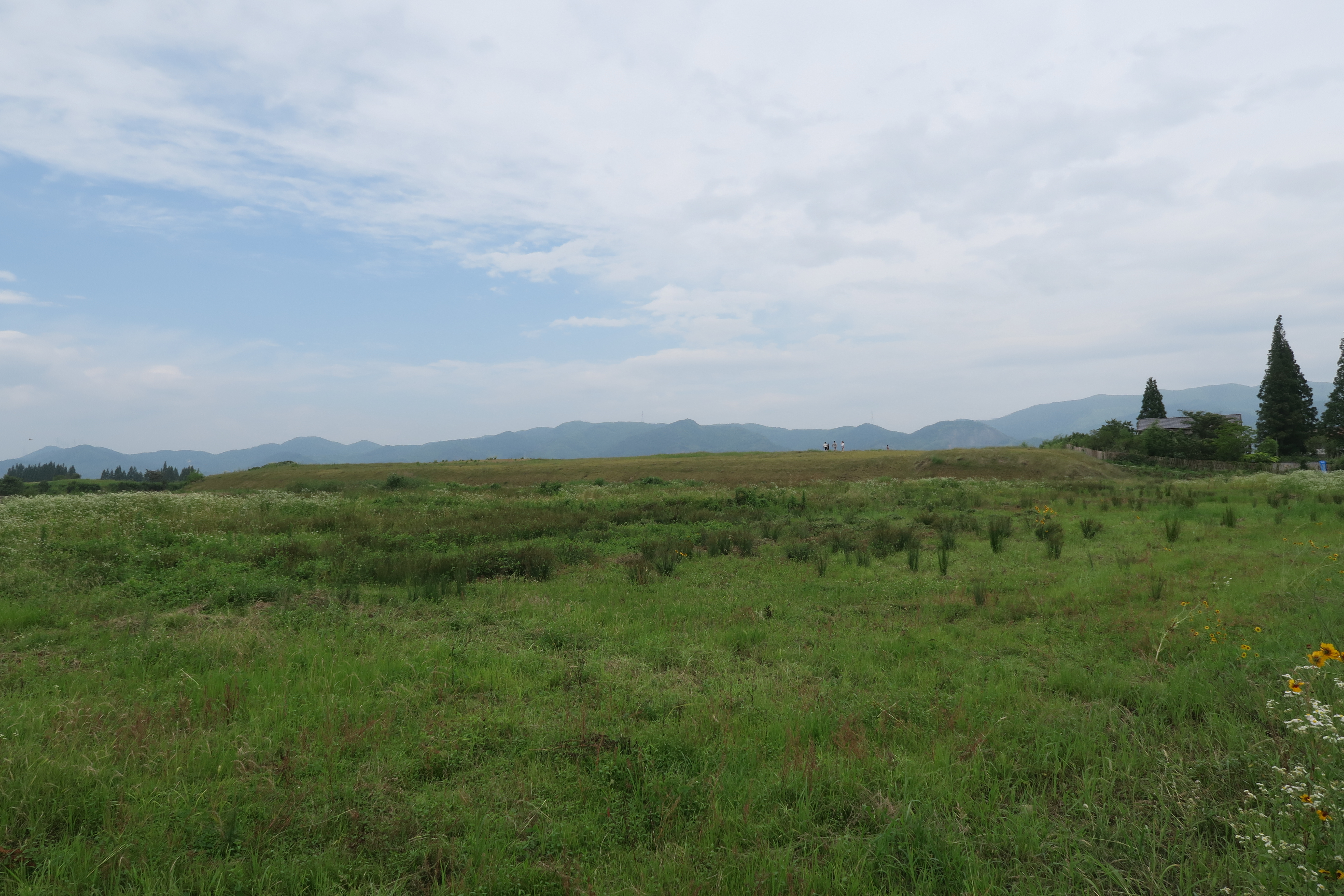 良渚古城莫角山遗址土台